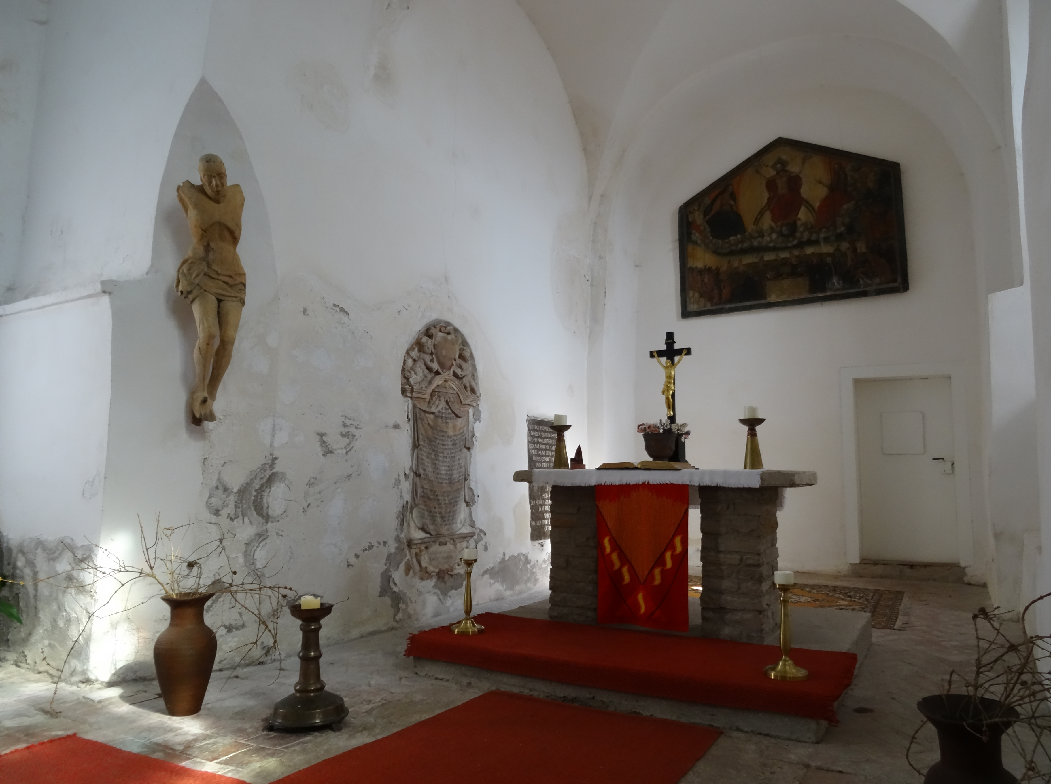 St. Michaelis (Großleinungen), gemauerter Tisch mit Steinplatte als Altar